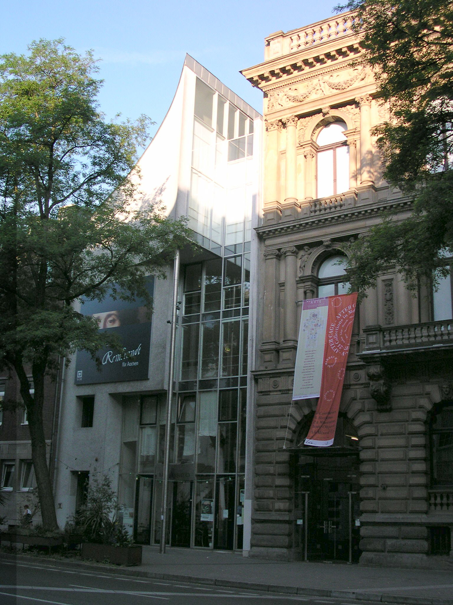 Aachen, Wilhelmstraße, Anbau an das Suermondt-Museum in einer 11*90 m großen Baulücke, Architekten Peter Busmann und Godfrid Haberer